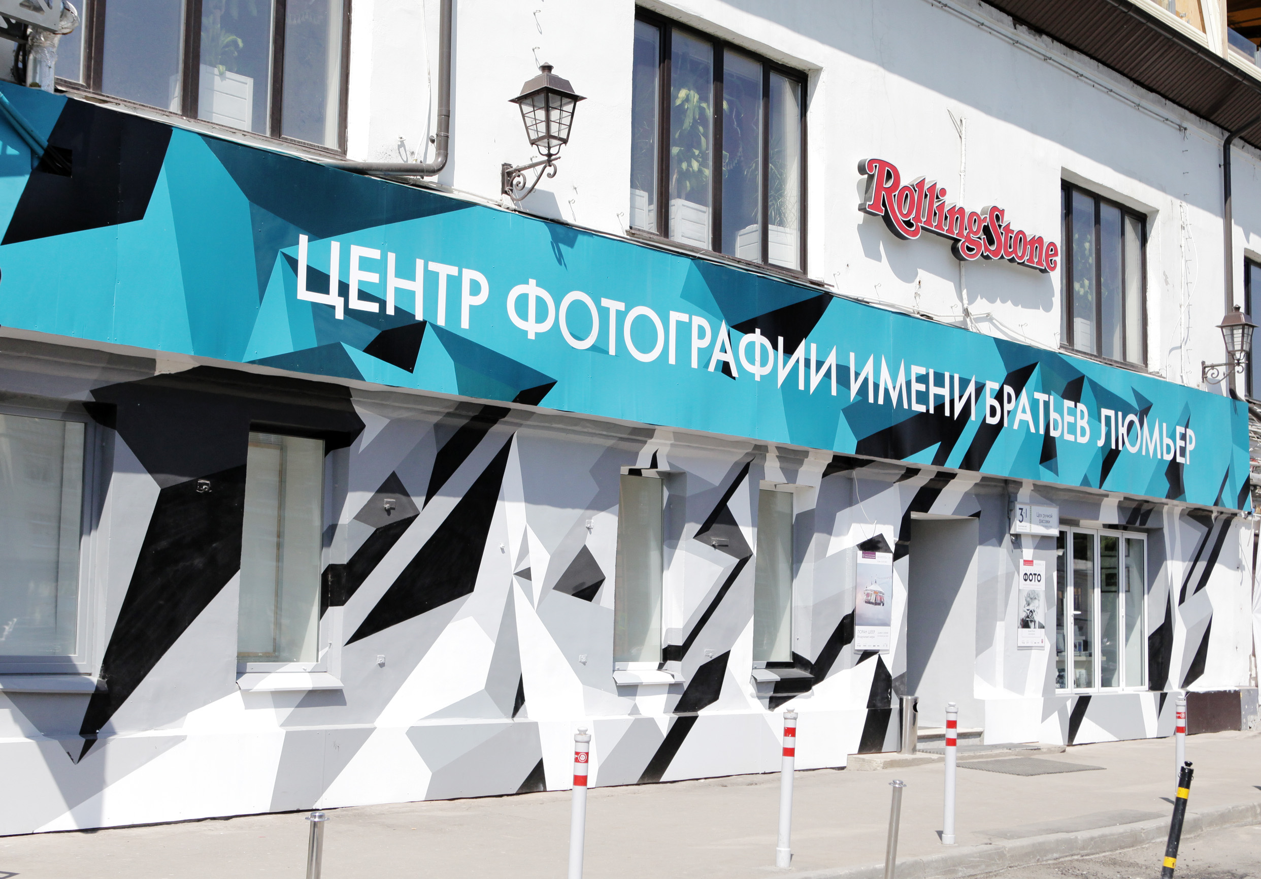 Фасад Центра фотографии, 2015